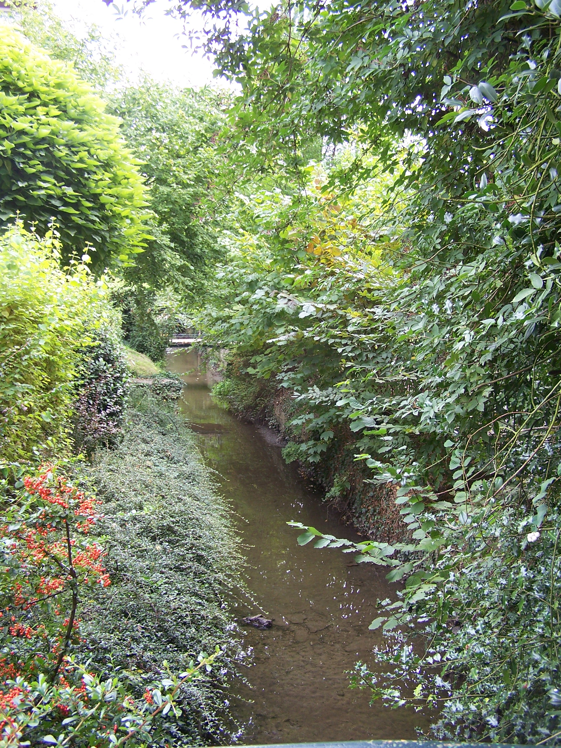 Le ru Maldroit à Plaisir (Yvelines, France)